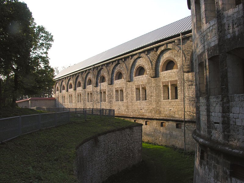 Ulm Wilhelmsburg Teil der Bundesfestung in Ulm Foto 2007 Wolfgang Pehlemann Wiesbaden PICT3242